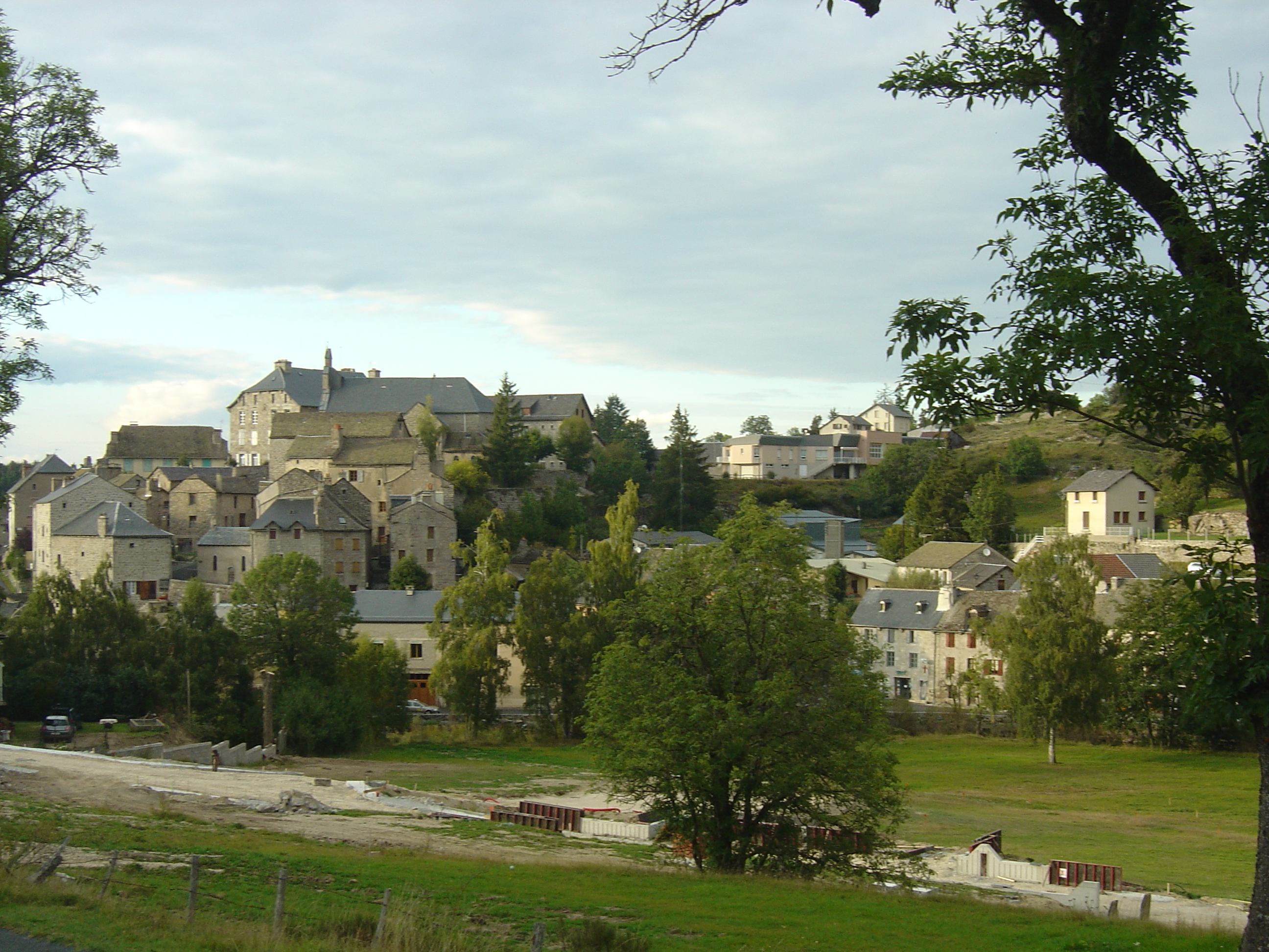 Village de Serverette